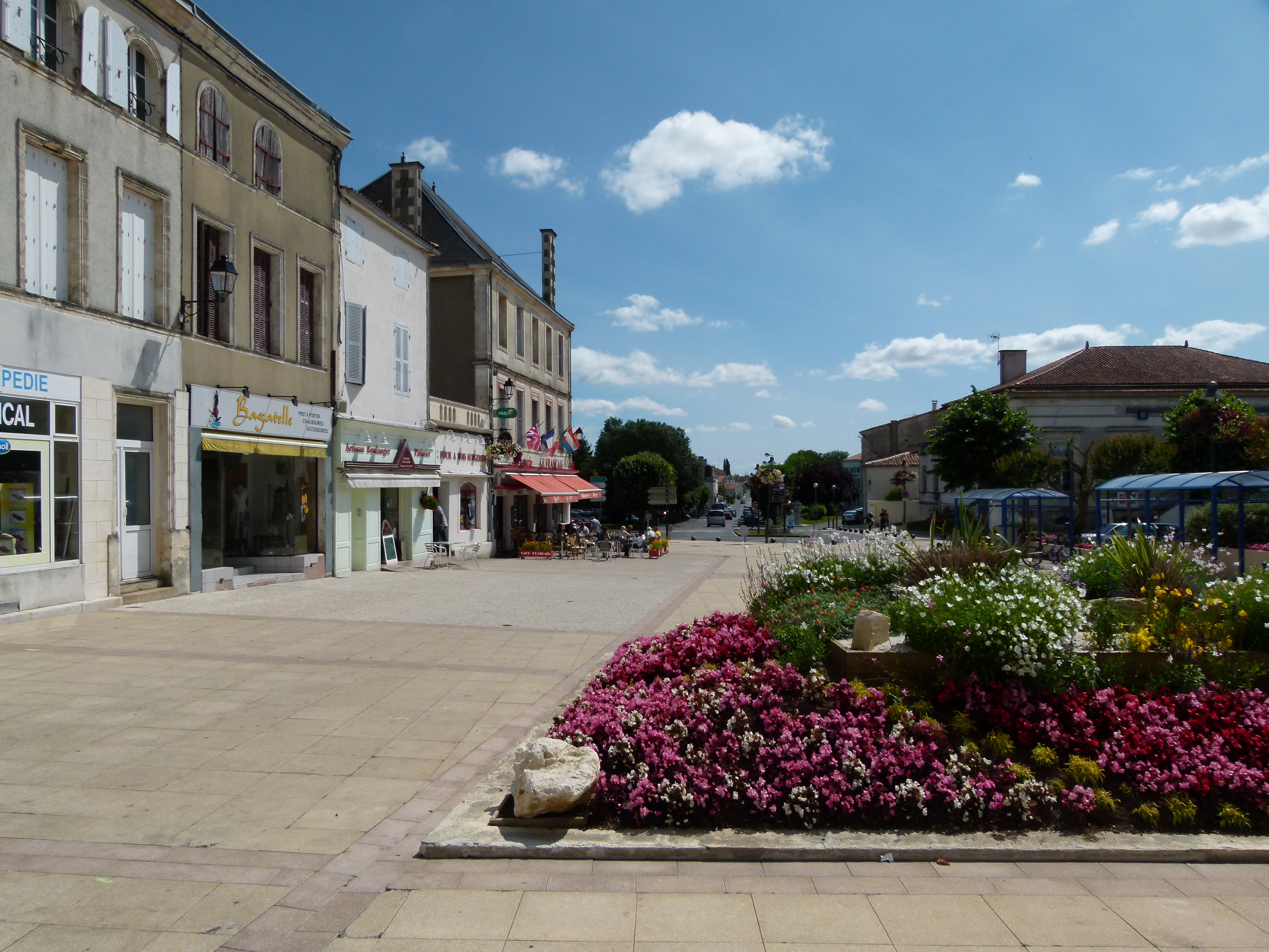 La rue Bersot dans le centre-ville de Surgères est l'artère piétonne de Surgères.